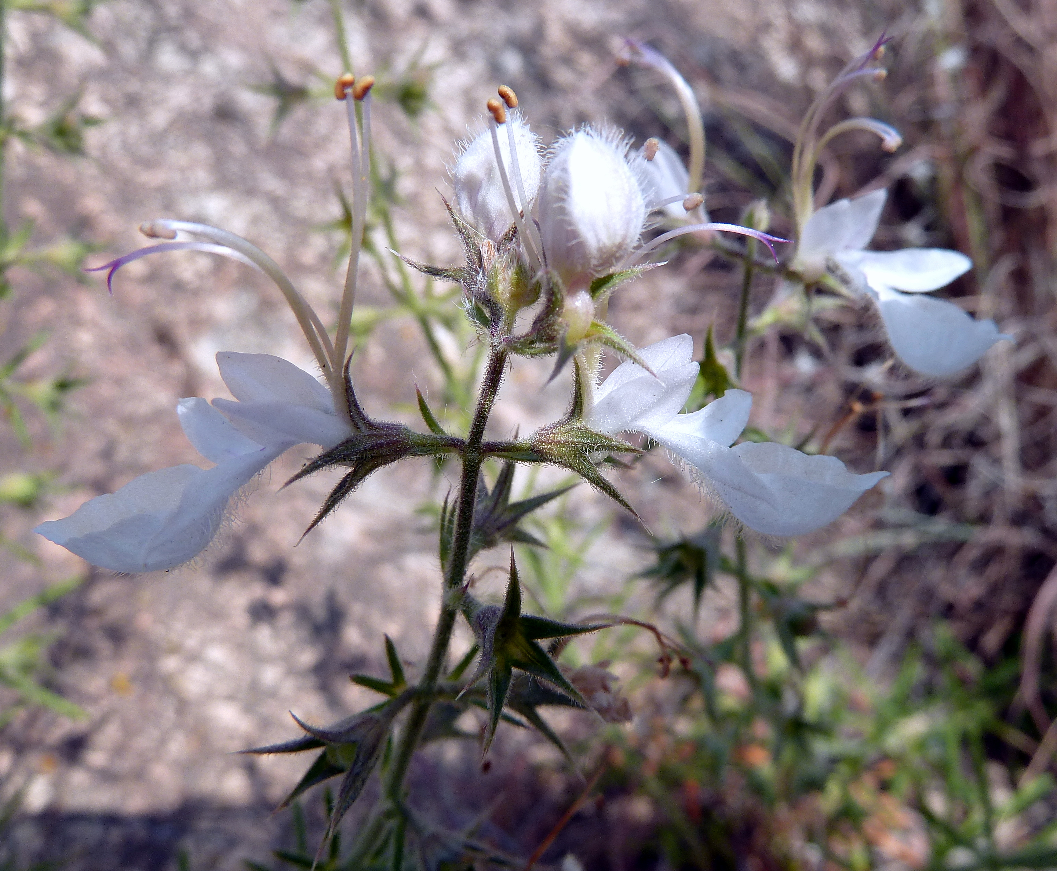 Teucrium pseudochamaepitys (Pinillo bastardo, Yerba de la Cruz) : Infloresecencia - Cabezo de las Fuentes/de los Ojales, Albatera (Alicante, España).